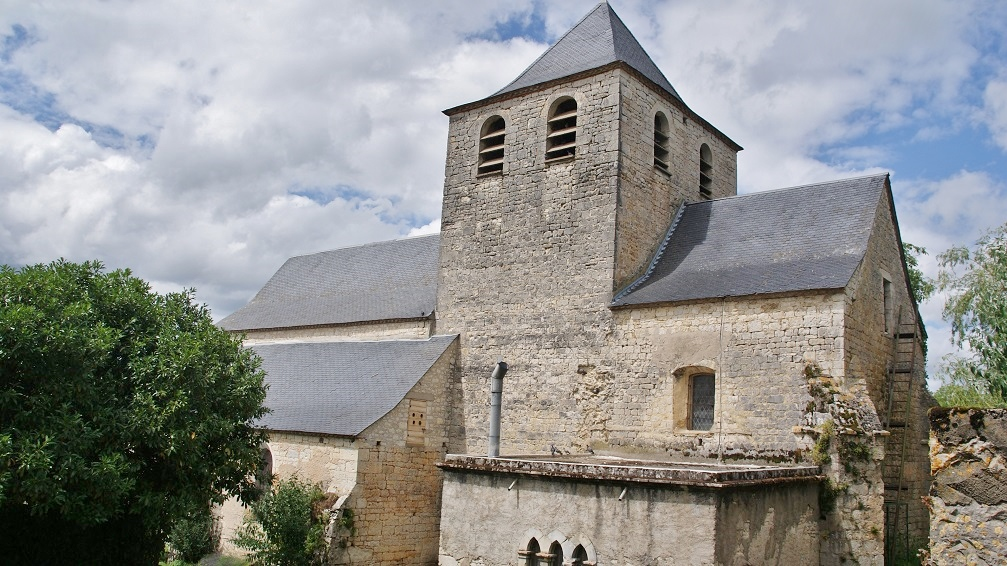 église Saint Pierre-es-lien